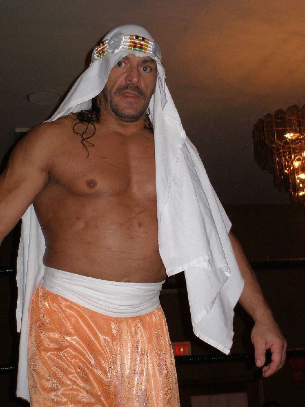 Le catcheur Sabu en mars 2008.